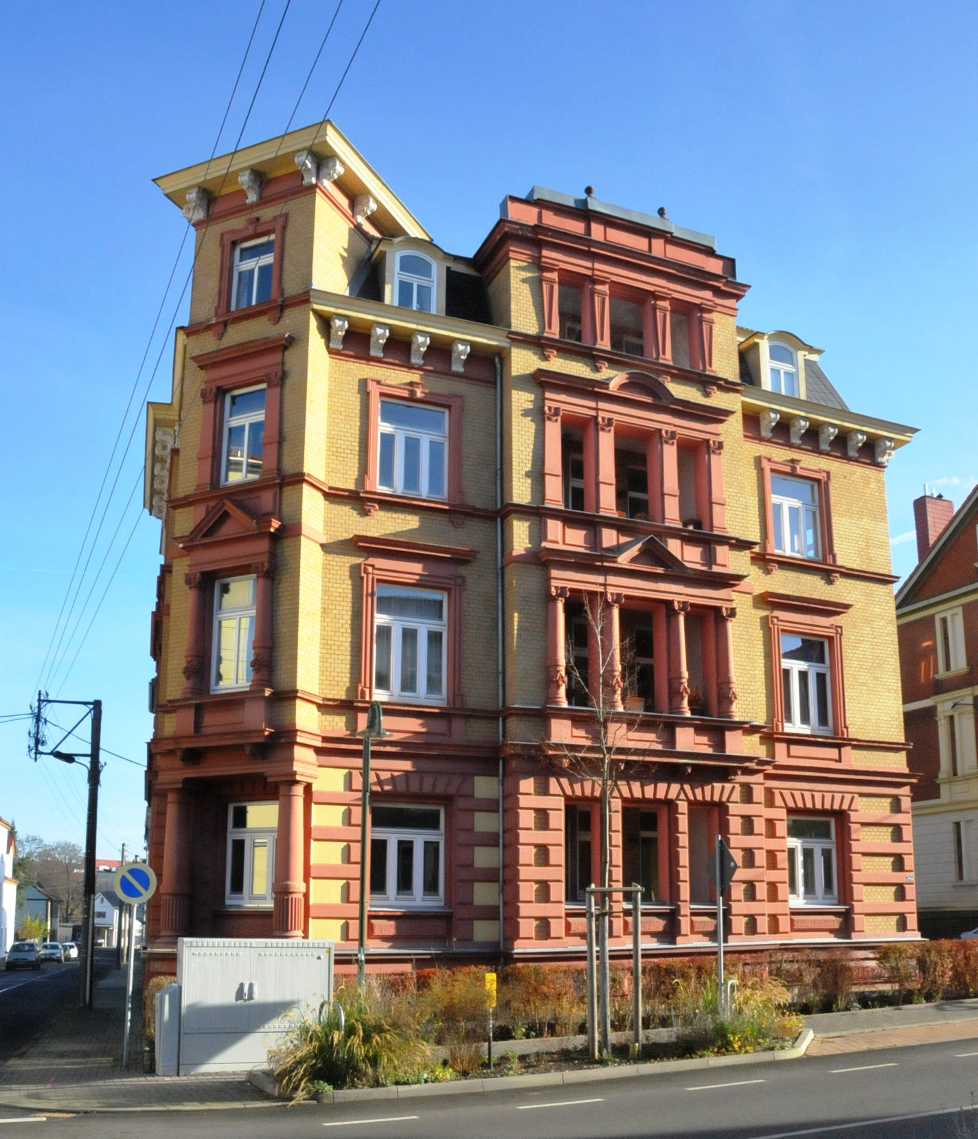 Gotha, 18.-März-Str. 34 a, Wohnhaus der Bauhauskünstlerin Marianne Brandt